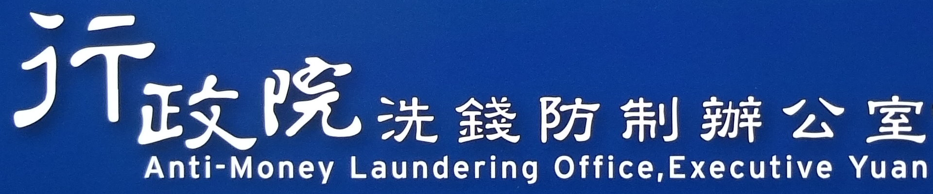 行政院洗錢防制辦公室文字標誌。